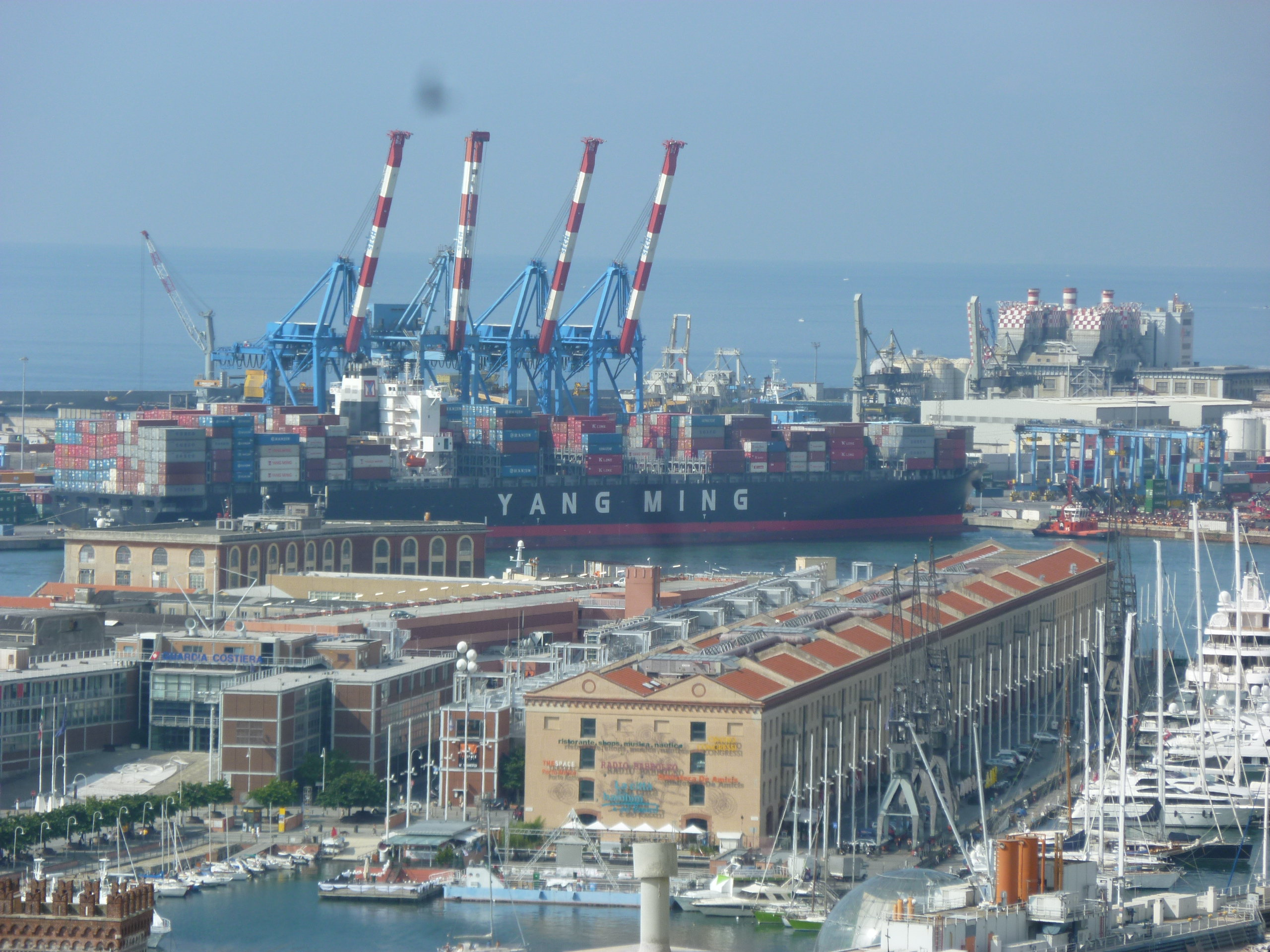 Genova